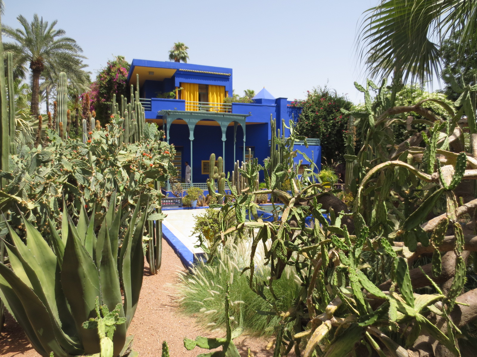 Majorelle Garden